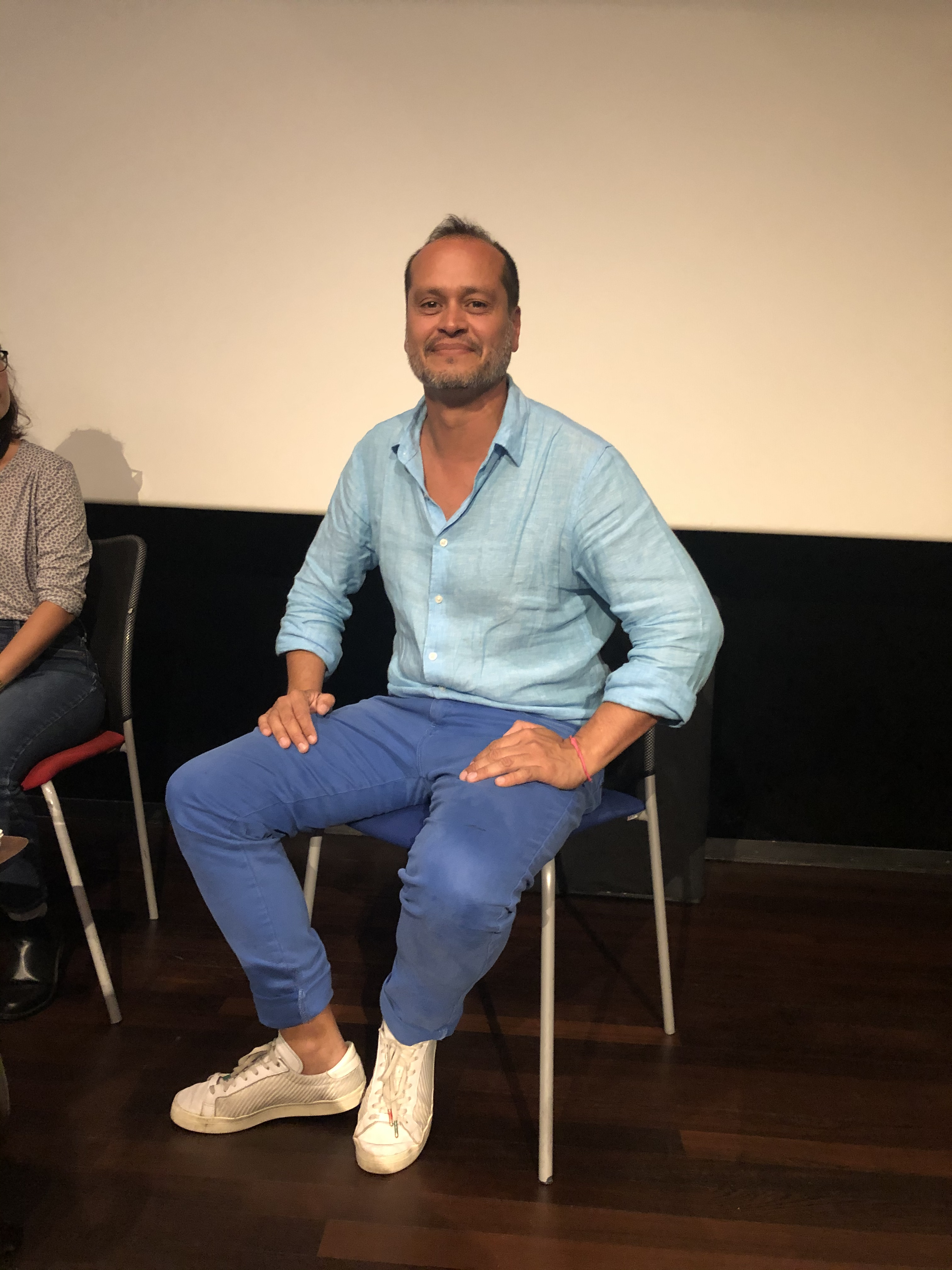 Marcelo Barbosa co réalisateur de Indianara au festival Everybody’s Perfect à Genève